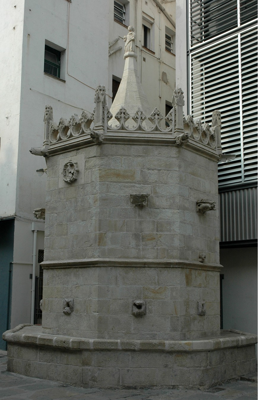 Font gòtica, Blanes, Girona